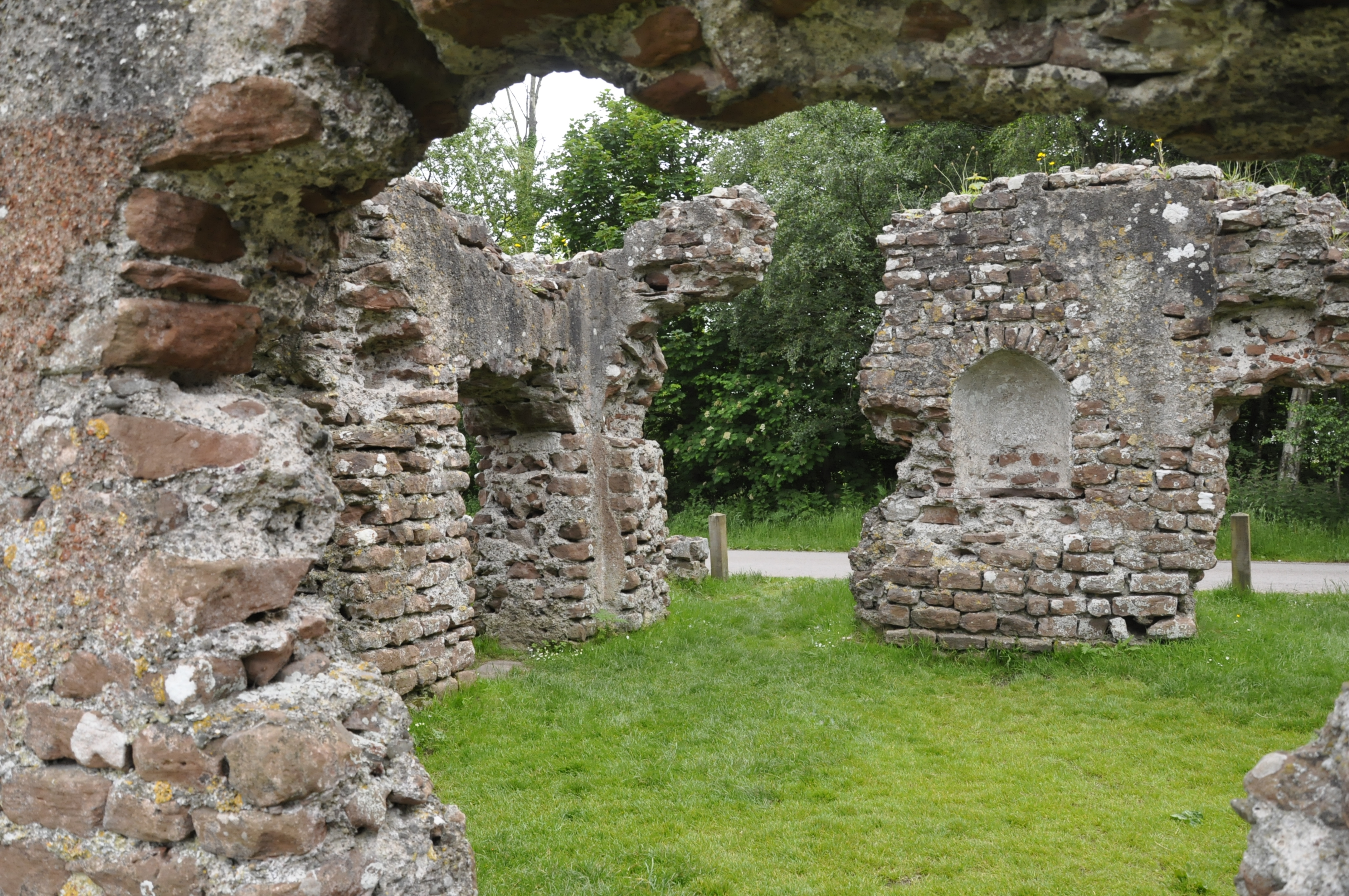 Het Romeins badhuis te Ravenglass, Engeland